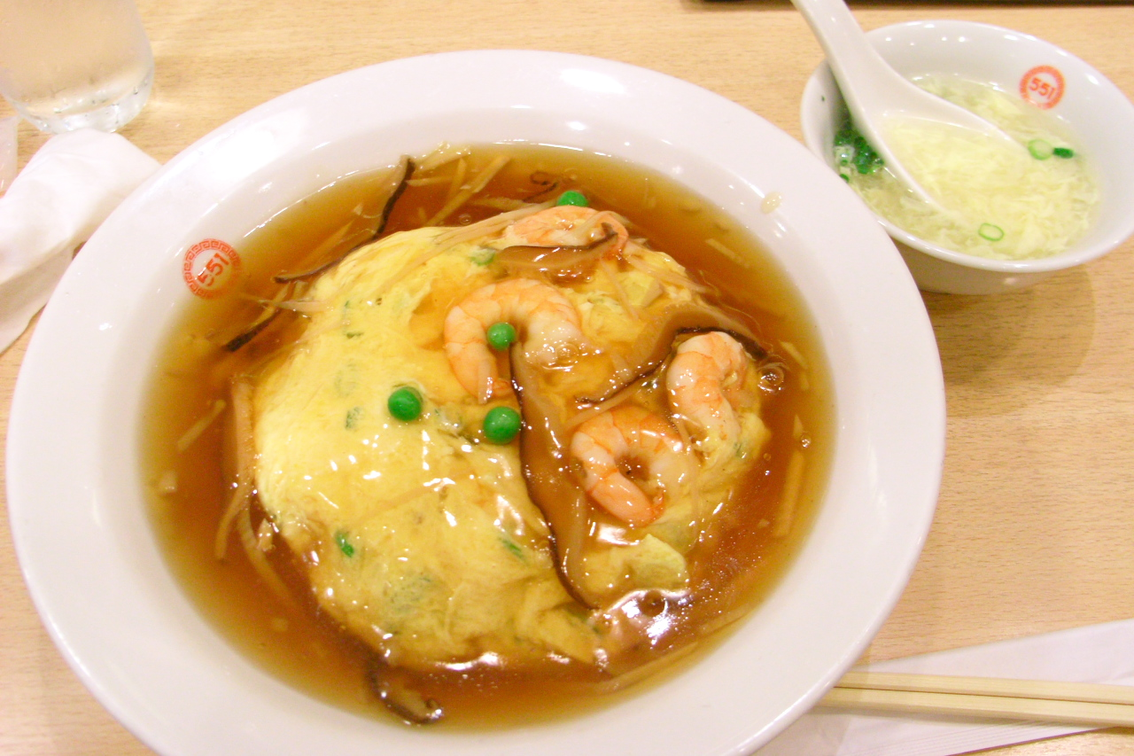 伊丹空港南ターミナルの1階にある蓬莱551で食べた天津丼。